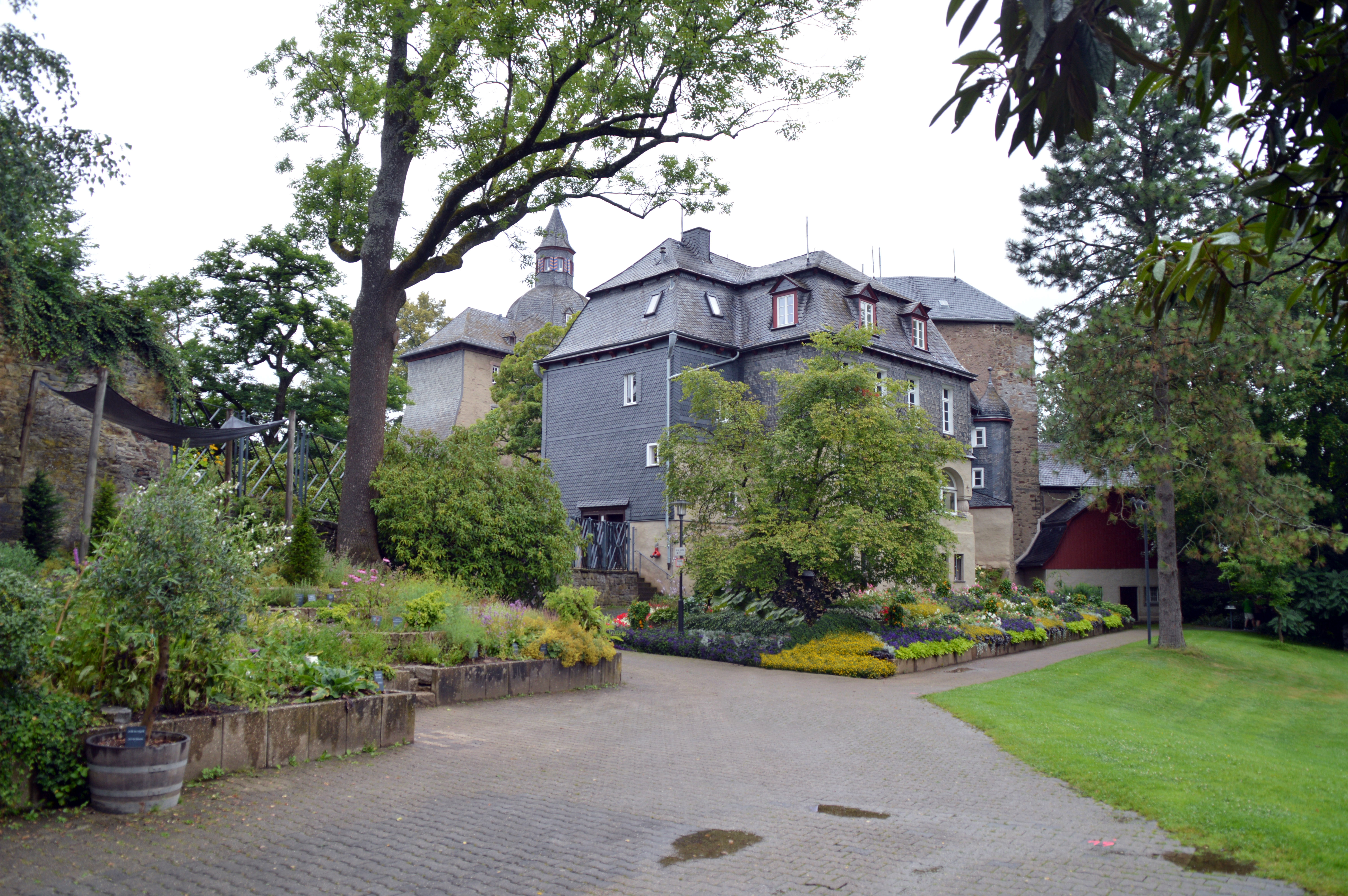 Oberen Schloss Kasteel Siegberg Siegerlandmuseum Peter Paul Rubens Huis van Nassau-Siegen